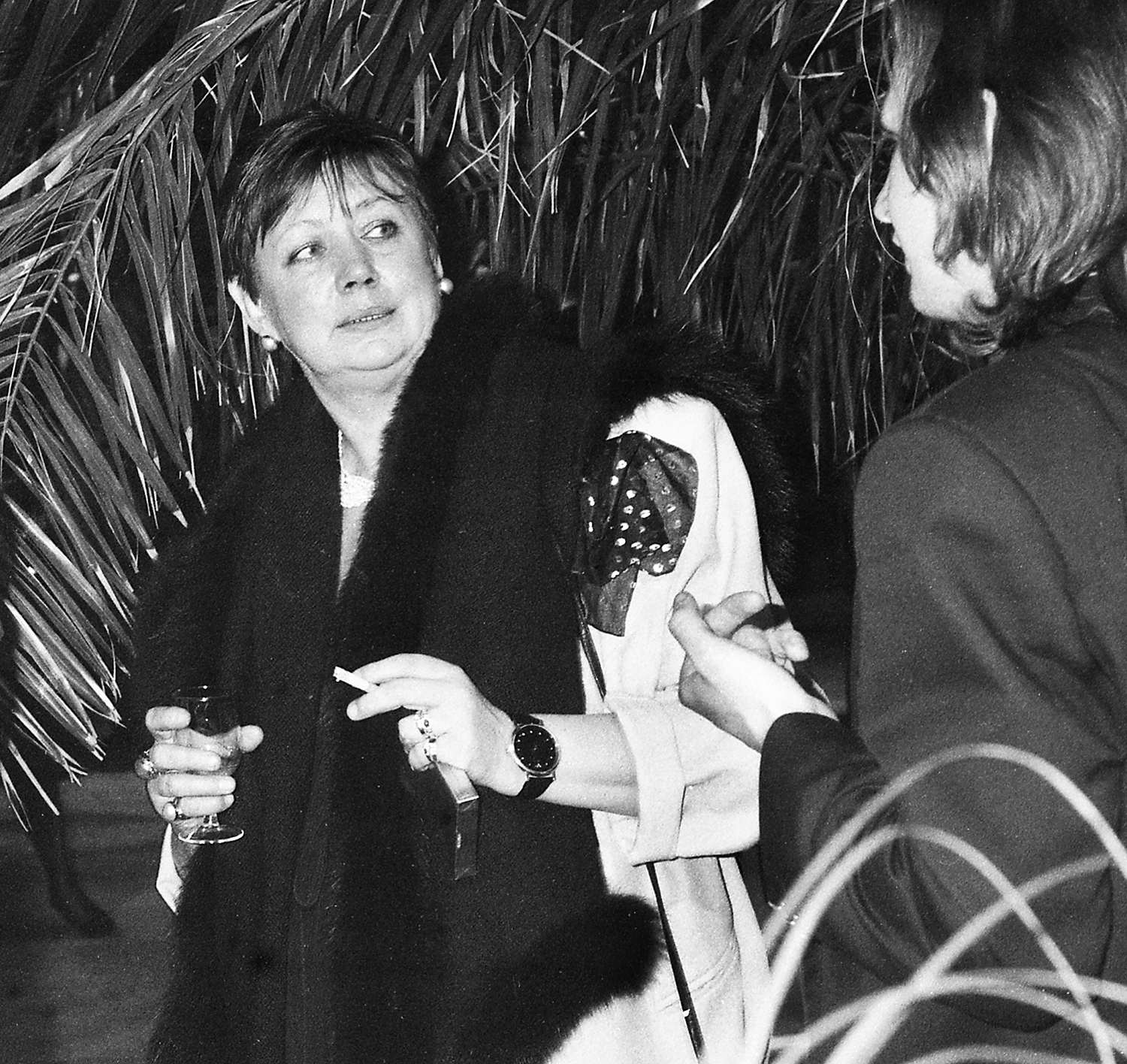 Ivi Eenmaa poliitik ja raamatukogundustegelane 93